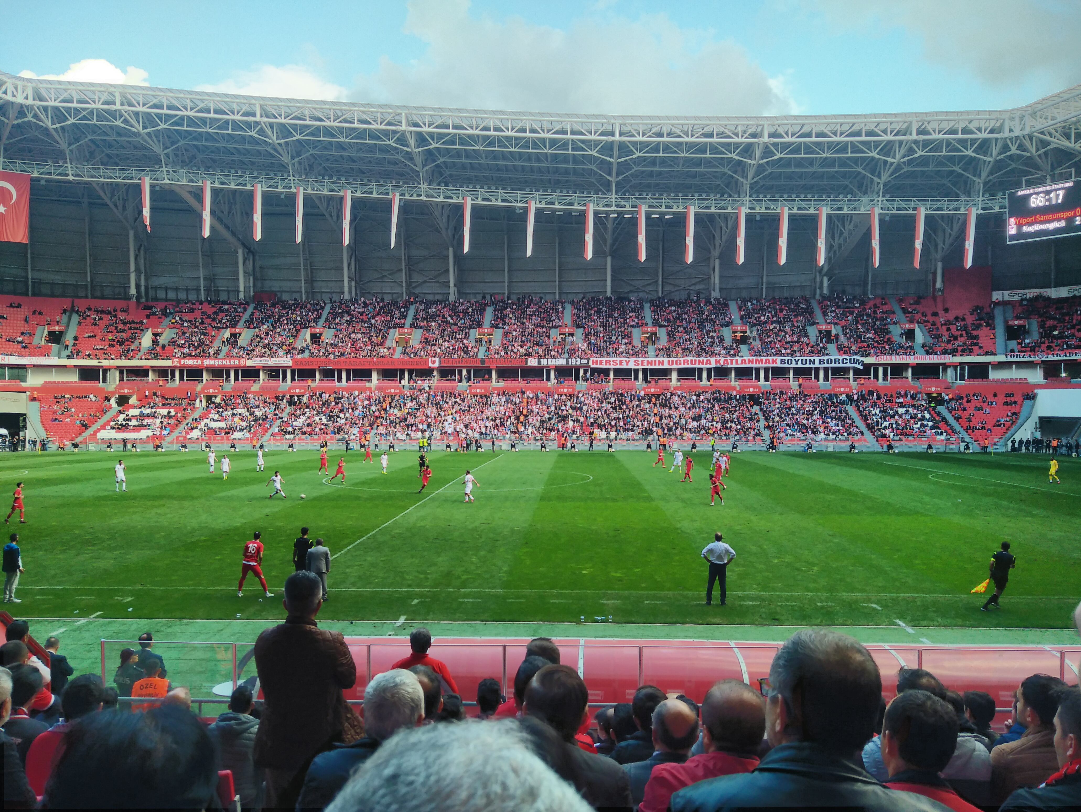 12 Kasım 2018 tarihindeki Samsunspor-Keçiörengücü maçından bir görüntü.